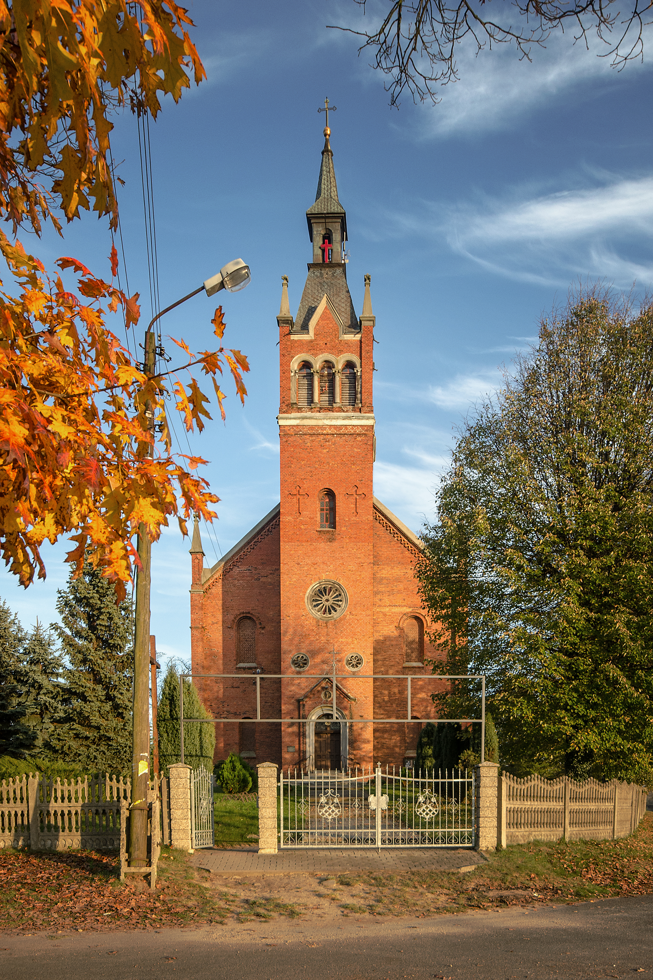 Kościół św. Piotra i Pawła i MB Wniebowziętej, dawny kościół ewangelicki